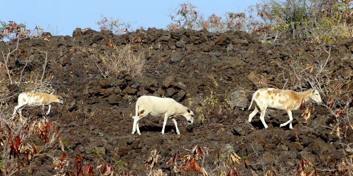 Иллюcтрация для викиучебника Гавайеведение